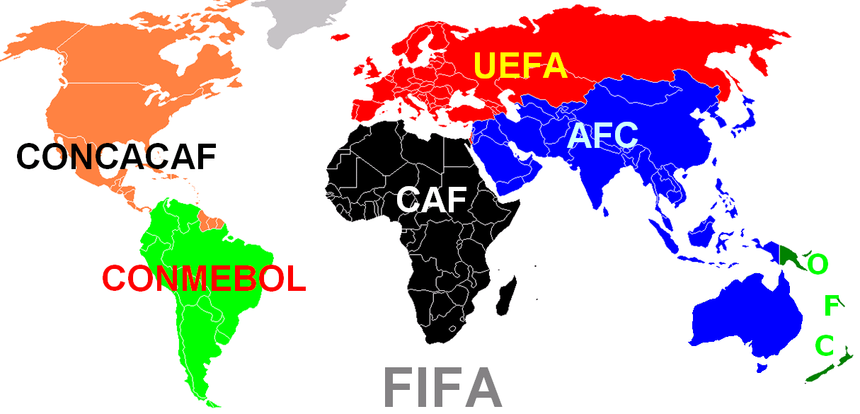 Die Kontinentalverbände der FIFA 2007 Sonstiges: Australien als AFC-Mitglied, Montenegro eigenständig